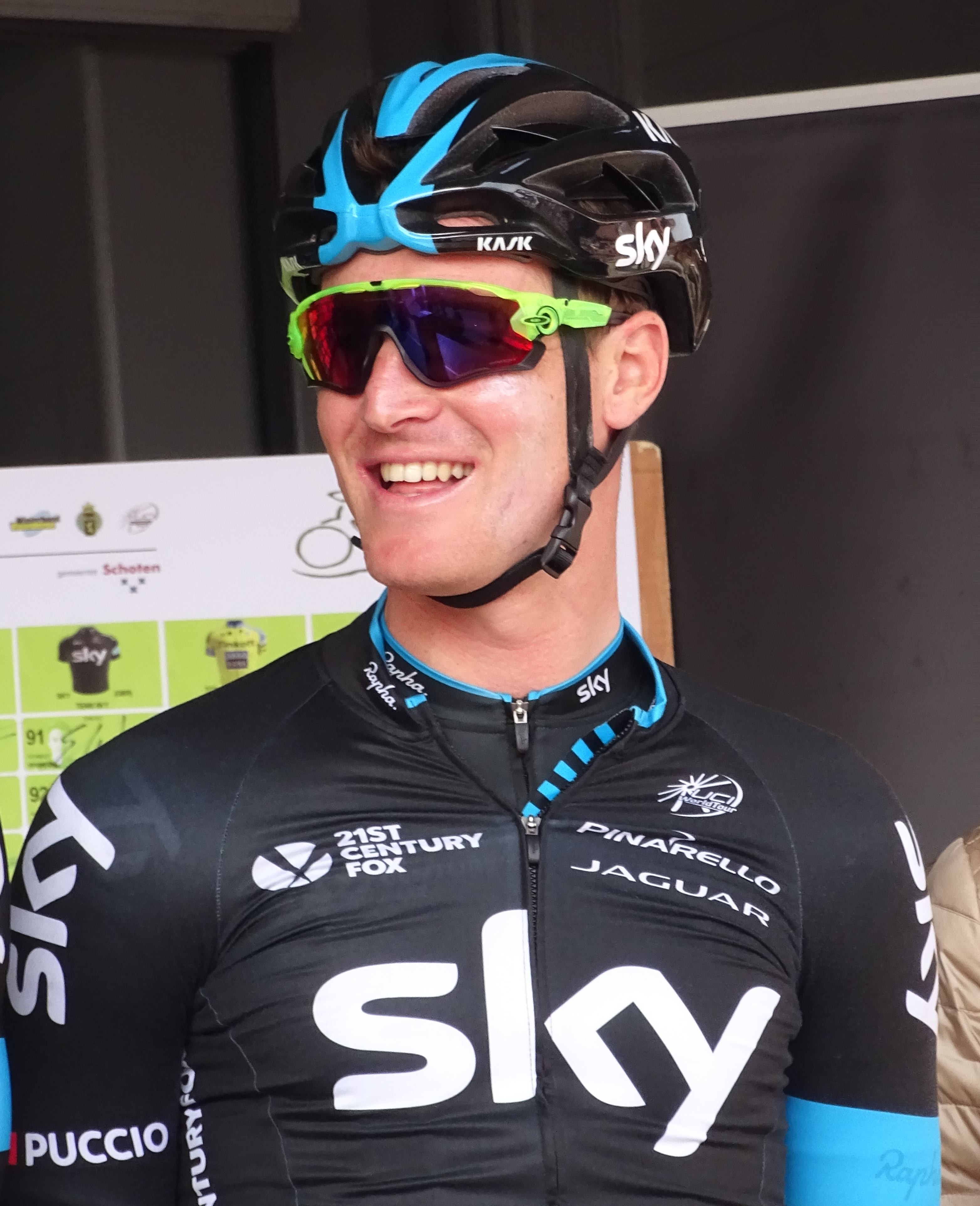 Reportage réalisé le mercredi 8 avril à l'occasion du départ du Grand Prix de l'Escaut 2015 à Anvers, Belgique.